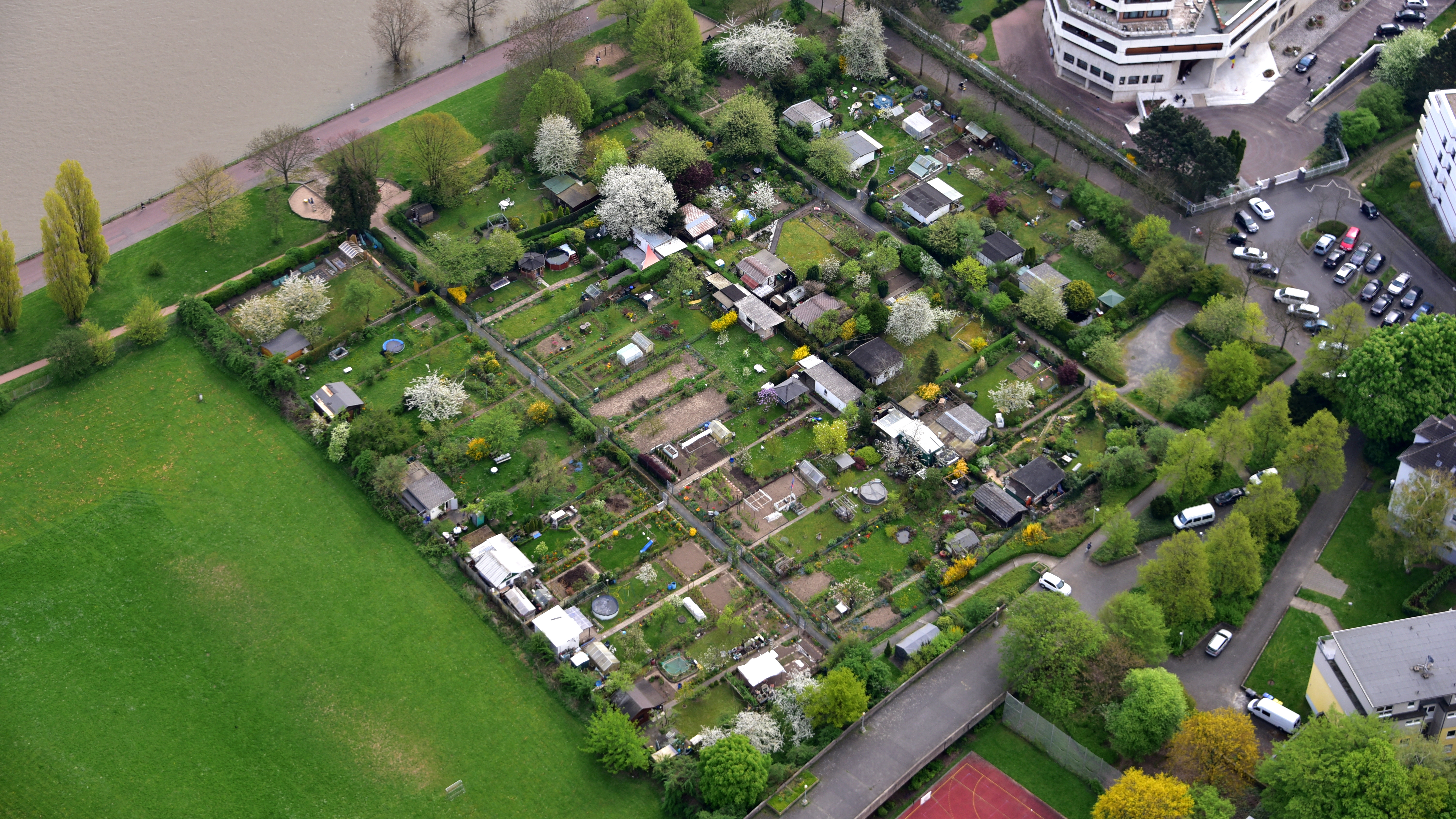 Bonn, Karl-Legien-Straße, Kleingarten, Schrebergarten